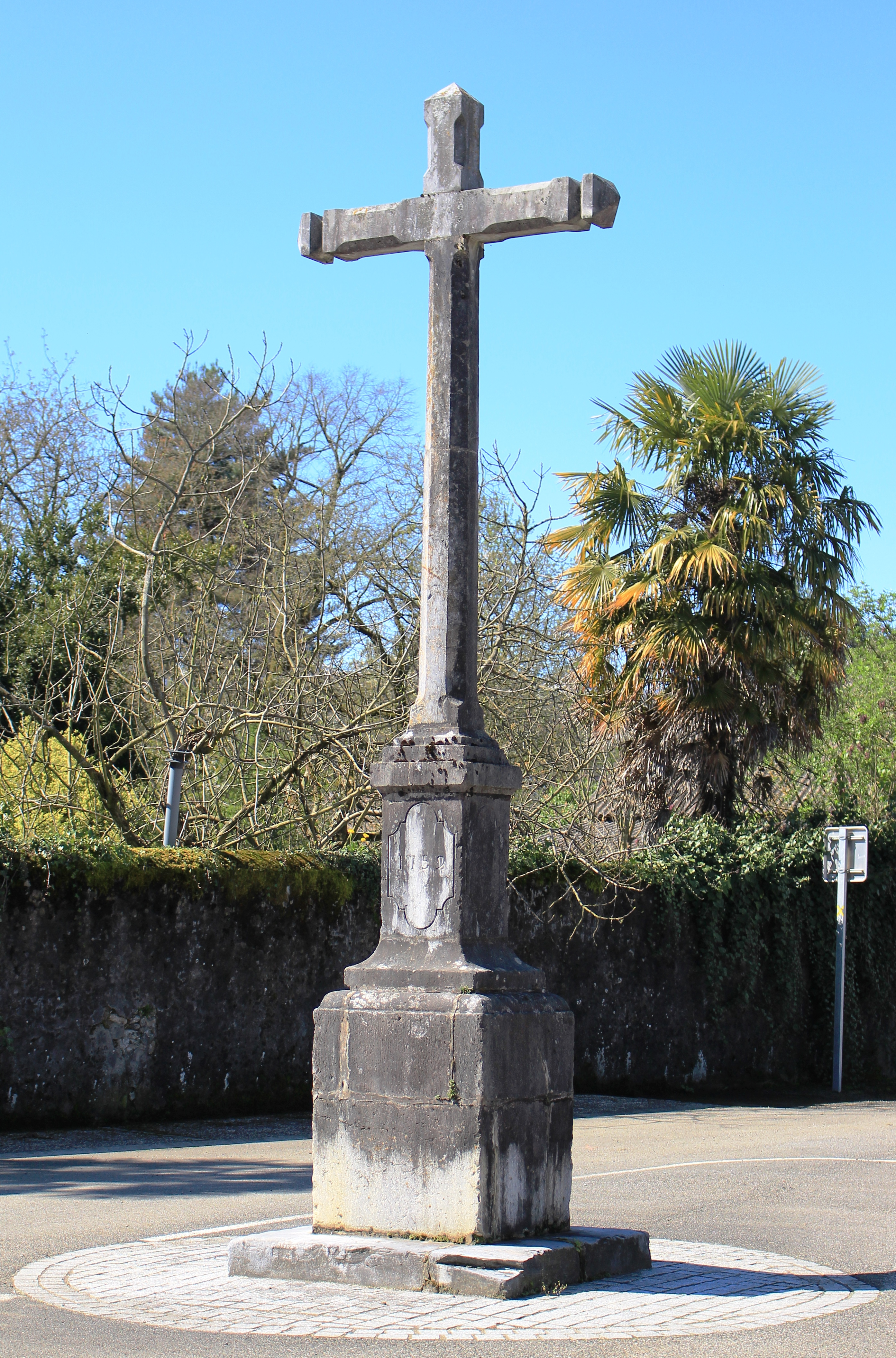 Croix de Barlest (Hautes-Pyrénées)